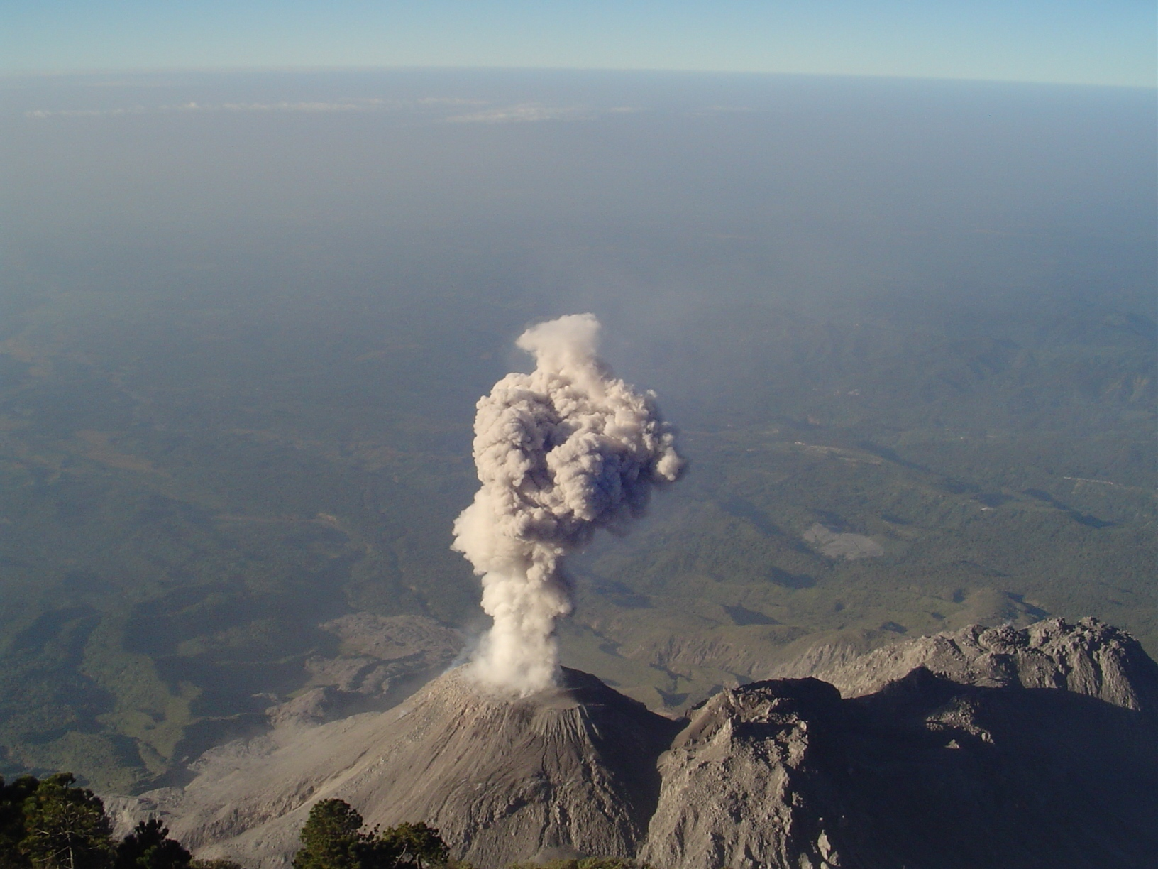 Volcan Santiaguito, Quetzaltenango, Guatemala